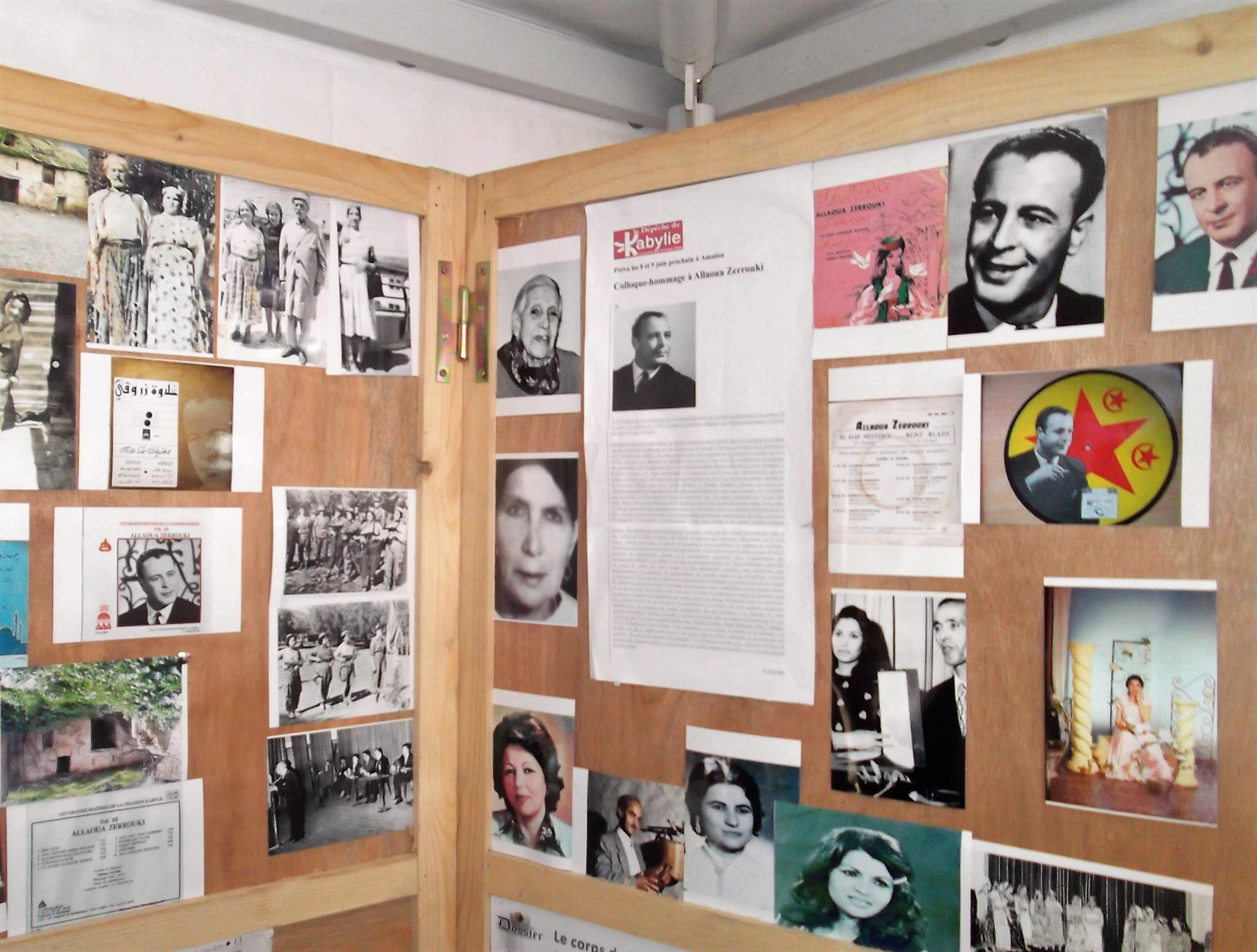 petit musée à la mémoire du ténor